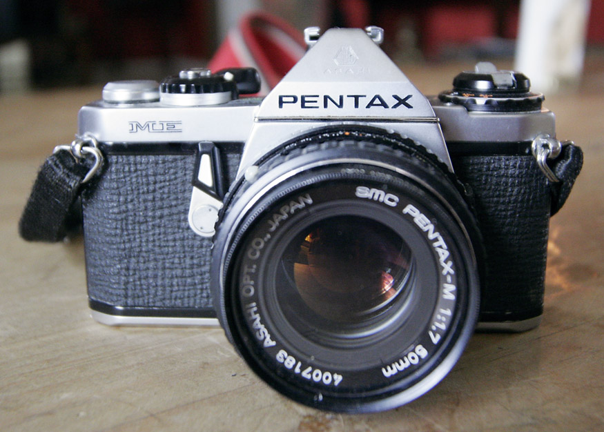 Pentax ME single-lens reflex camera